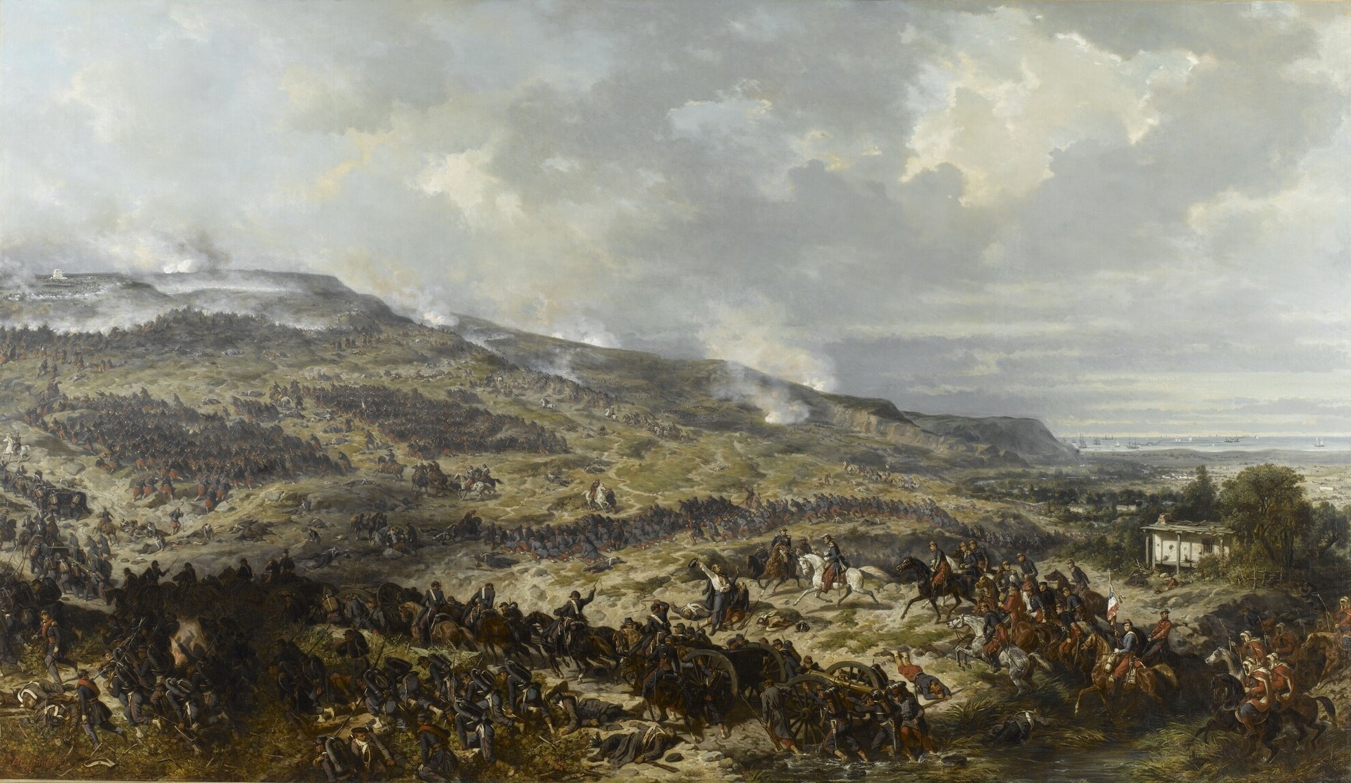 Bataille de l'Alma, 20 septembre 1854. Guerre de Crimée (1853-1856). Dimensions : 200 x 348 cm. Matière et technique : huile sur toile.